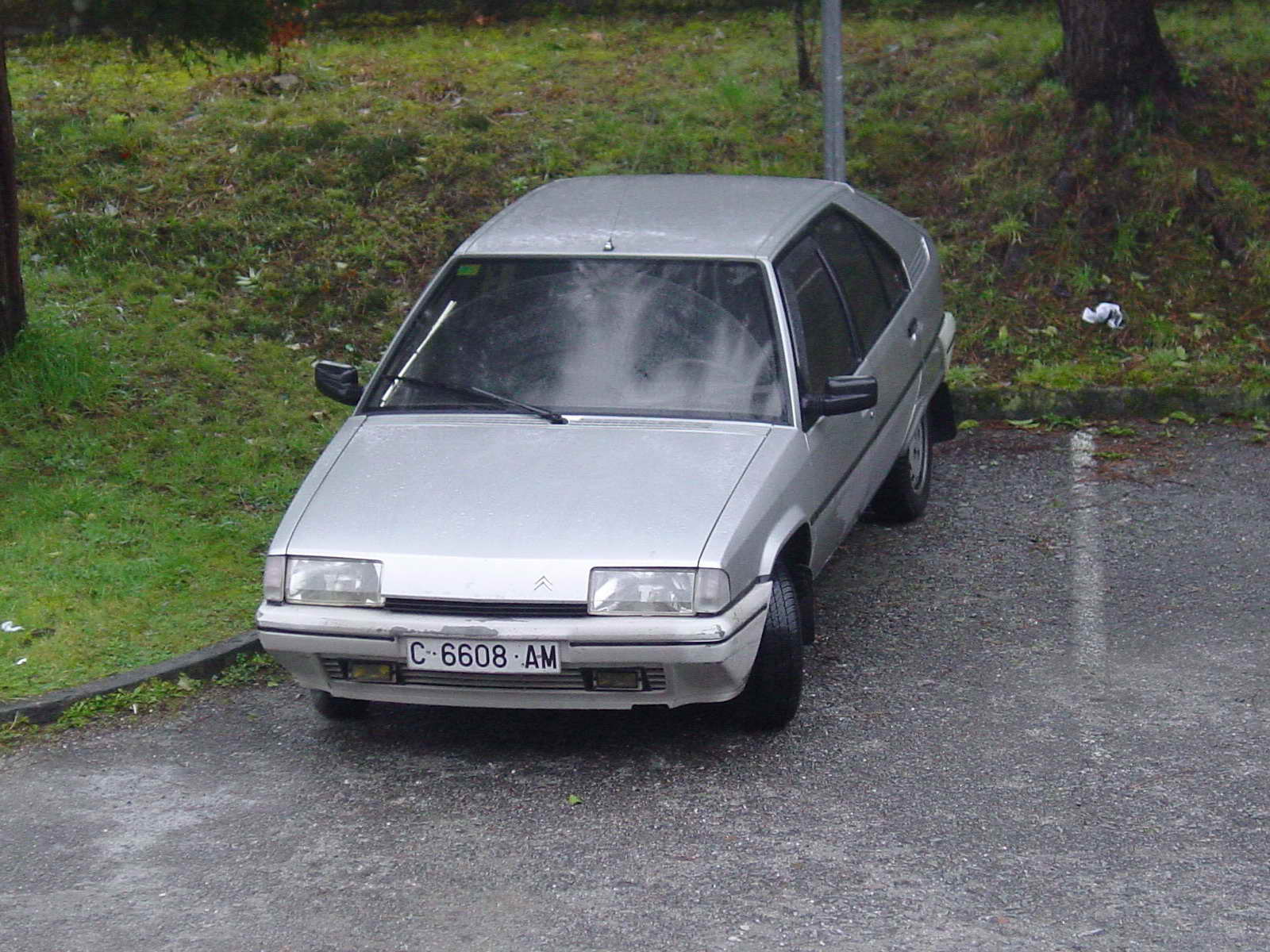 self made